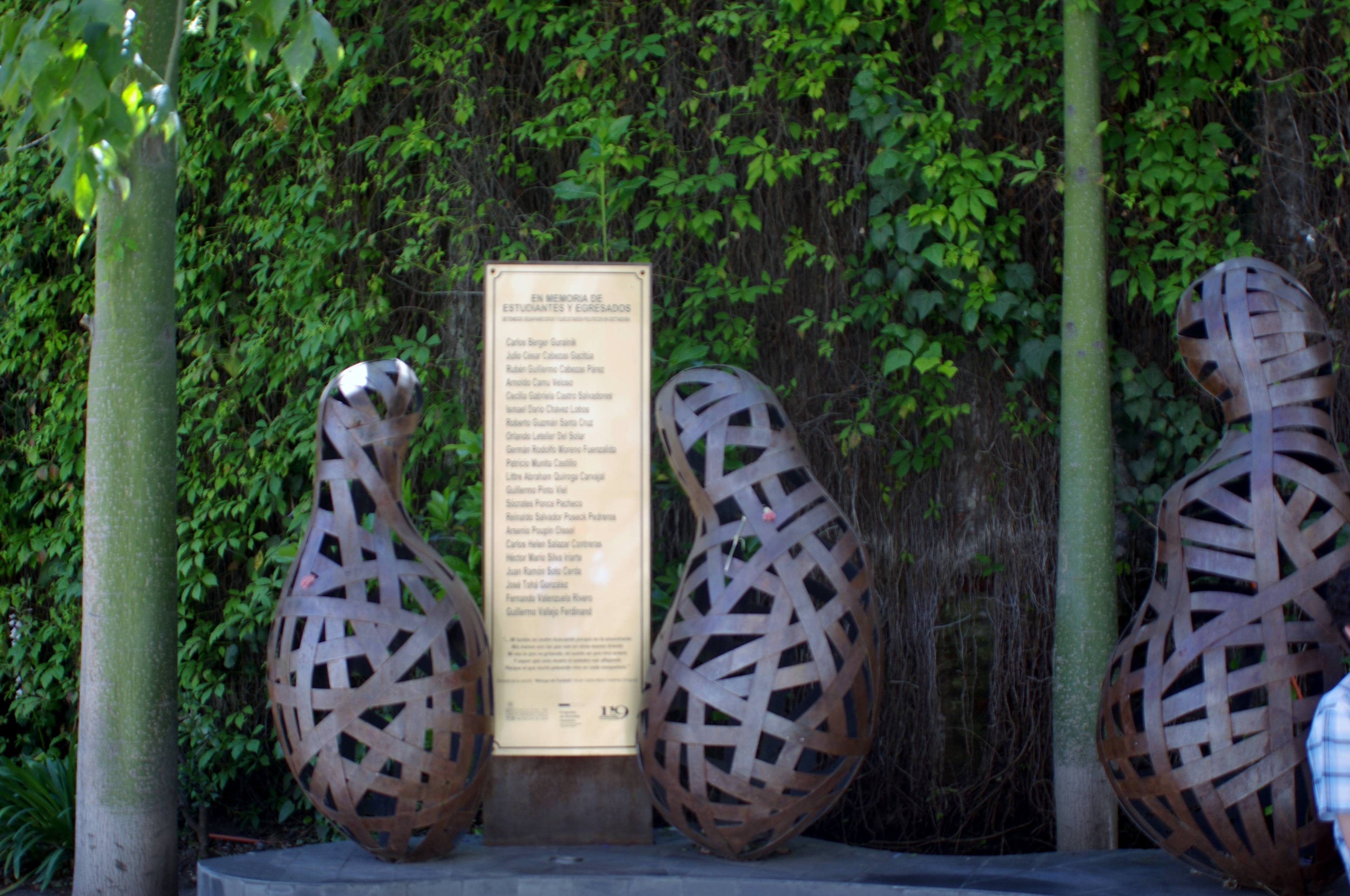 Memorial a estudiantes y egresados víctimas de la dictadura del general Augusto Pinochet; inaugurado en 2014 en el patio de la Escuela de Derecho de la Universidad de Chile. La placa dice: "En memoria de estudiantes y egresados detenidos desaparecidos ejecutados políticos en dictadura" y luego viene la lista alfabética de 21 víctimas: Carlos Berger Guralnik, Julio César Cabezas Gacitúa, Rubén Guillermo Cabezas Pérez, Arnoldo Camu Veloso, Cecilia Grabriela Castro Salvadores, Ismael Darío Chávez Lobos, Roberto Guzman Santa Cruz, Orlando Letelier del Solar, Germán Rodolfo Moreno Fuenzalida, Patricio Munita Castillo, Guillermo Pinto Viel, Sócrates Ponce Pacheco, Reinaldo Salvador Poseck Pedreros, Arsenio Poupin Oissel, Littre Abraham Quiroga Carvajal, Carlos Helen Salazar Contreras, Héctor Mario Silva Iriarte, Juan Ramón Soto Cerda, José Tohá González, Fernando Valenzuela Rivero y Guillermo Vallejos Ferdinand.